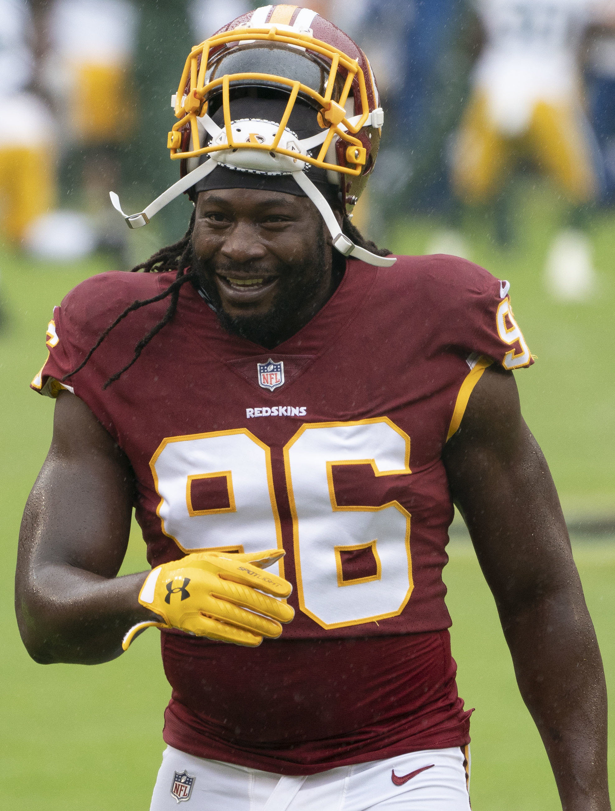 Packers at Redskins 09/23/18